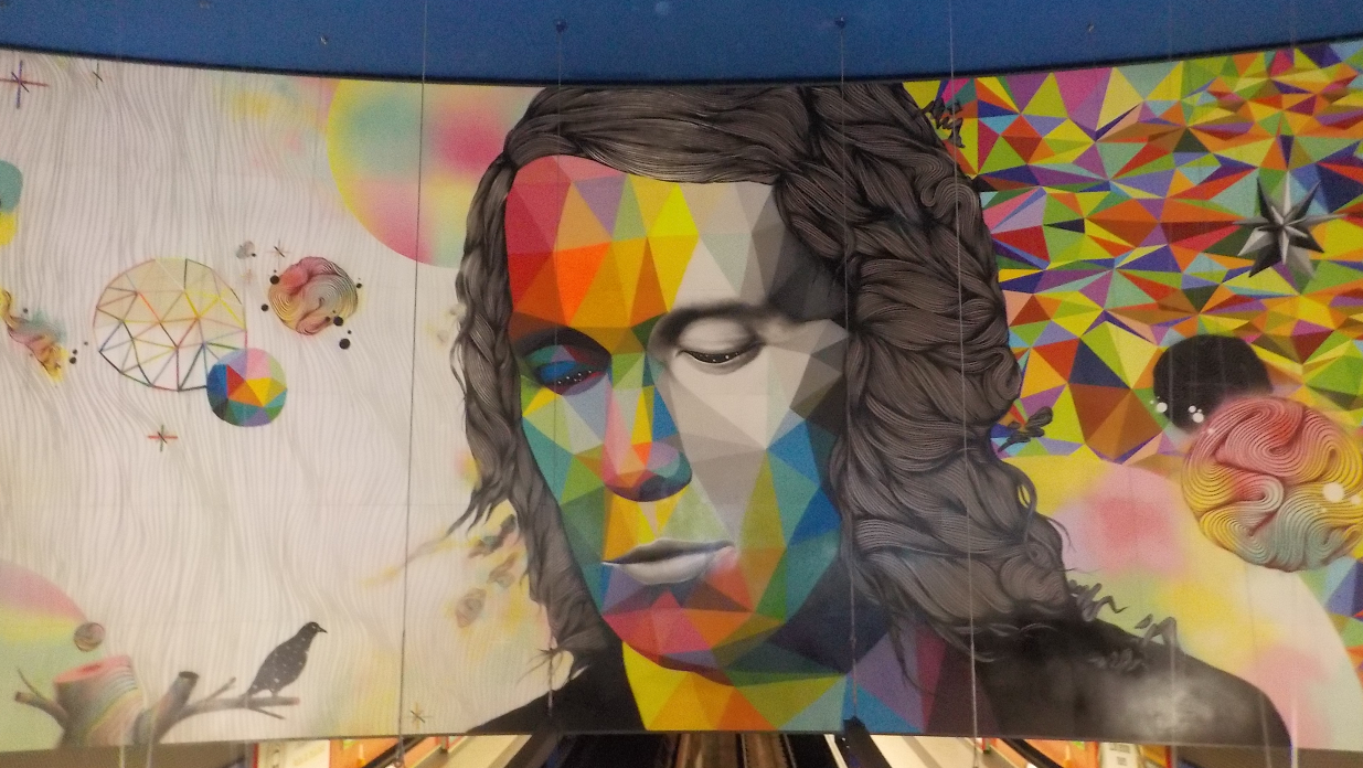 Fresque à la station terminus de la ligne 9 Paco de Lucia